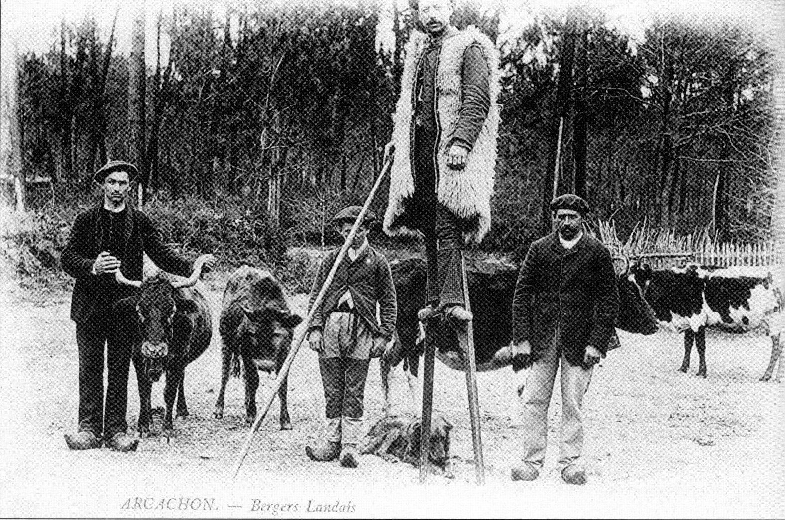 Artzain eta unai Landatarrak XIX.en mendearen amaieran. Bi behi landatar ikusten dira argazkian.